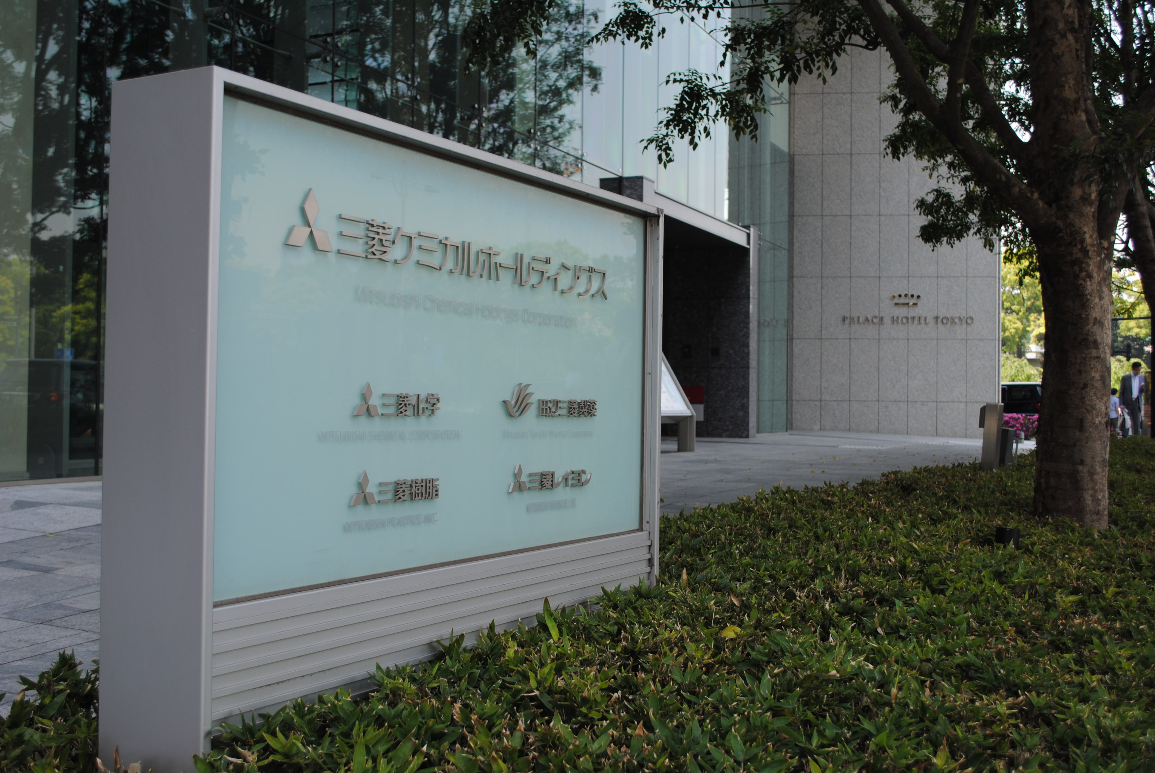 三菱ケミカルホールディングス本社。東京都千代田区丸の内一丁目1番1号